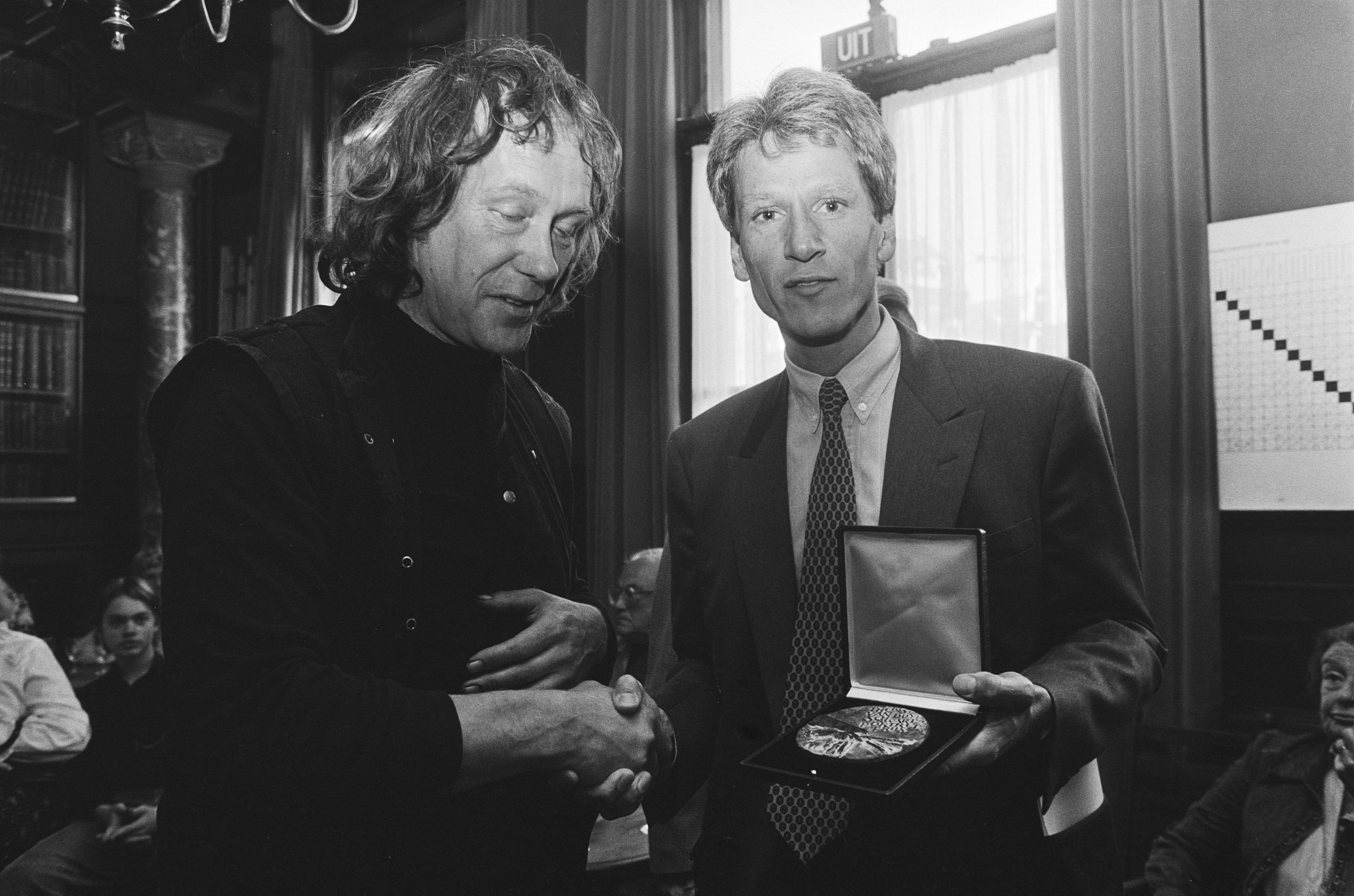 Collectie / Archief : Fotocollectie Anefo Reportage / Serie : [ onbekend ] Beschrijving : Uitreiking medaille bij de therese van Duyl-Schwartze Portretprijs Datum : 29 mei 1985 Trefwoorden : Uitreikingen, medailles Persoonsnaam : Eric Claus, Glansdorp, Aart, Herman Gordijn, Joop Birke, P. Landkroon Fotograaf : Vollebregt, Sjakkelien / Anefo Auteursrechthebbende : Nationaal Archief Materiaalsoort : Negatief (zwart/wit) Nummer archiefinventaris : bekijk toegang 2.24.01.05 Bestanddeelnummer : 933-3389